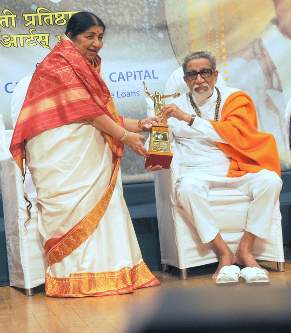 Bal Thackeray and Lata Mangeshkar at 70th Master Dinanath Mangeshkar Awards